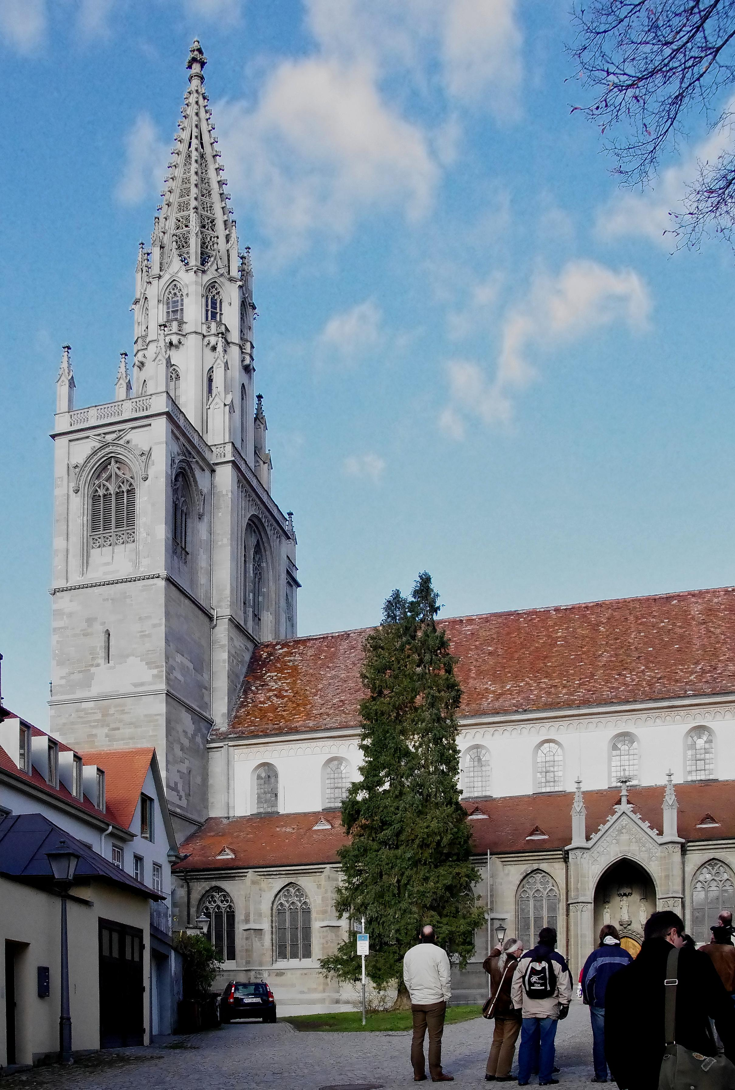 Blick auf das Münster